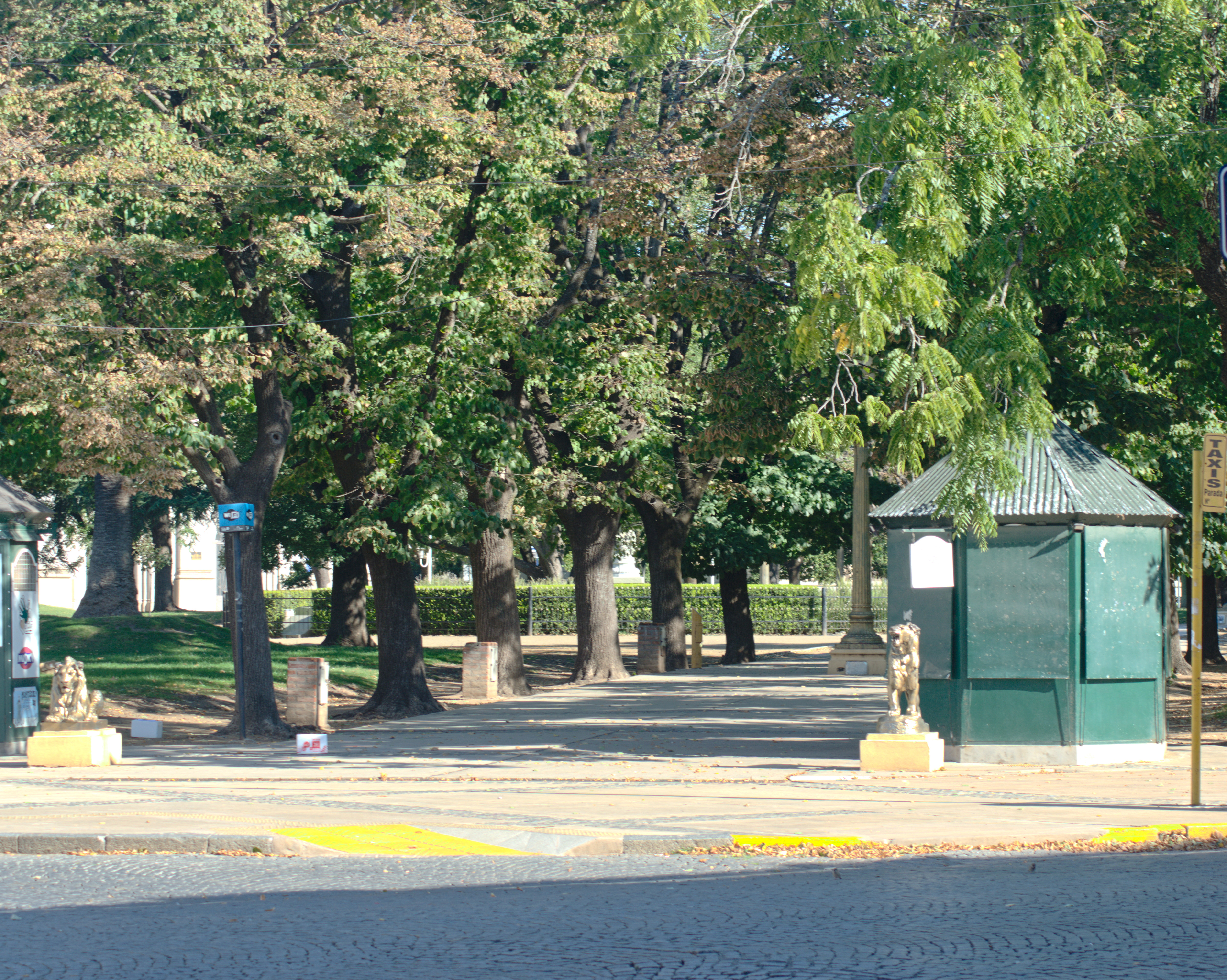 Plaza Independencia de Tandil vacía por la pandemia de COVID2019